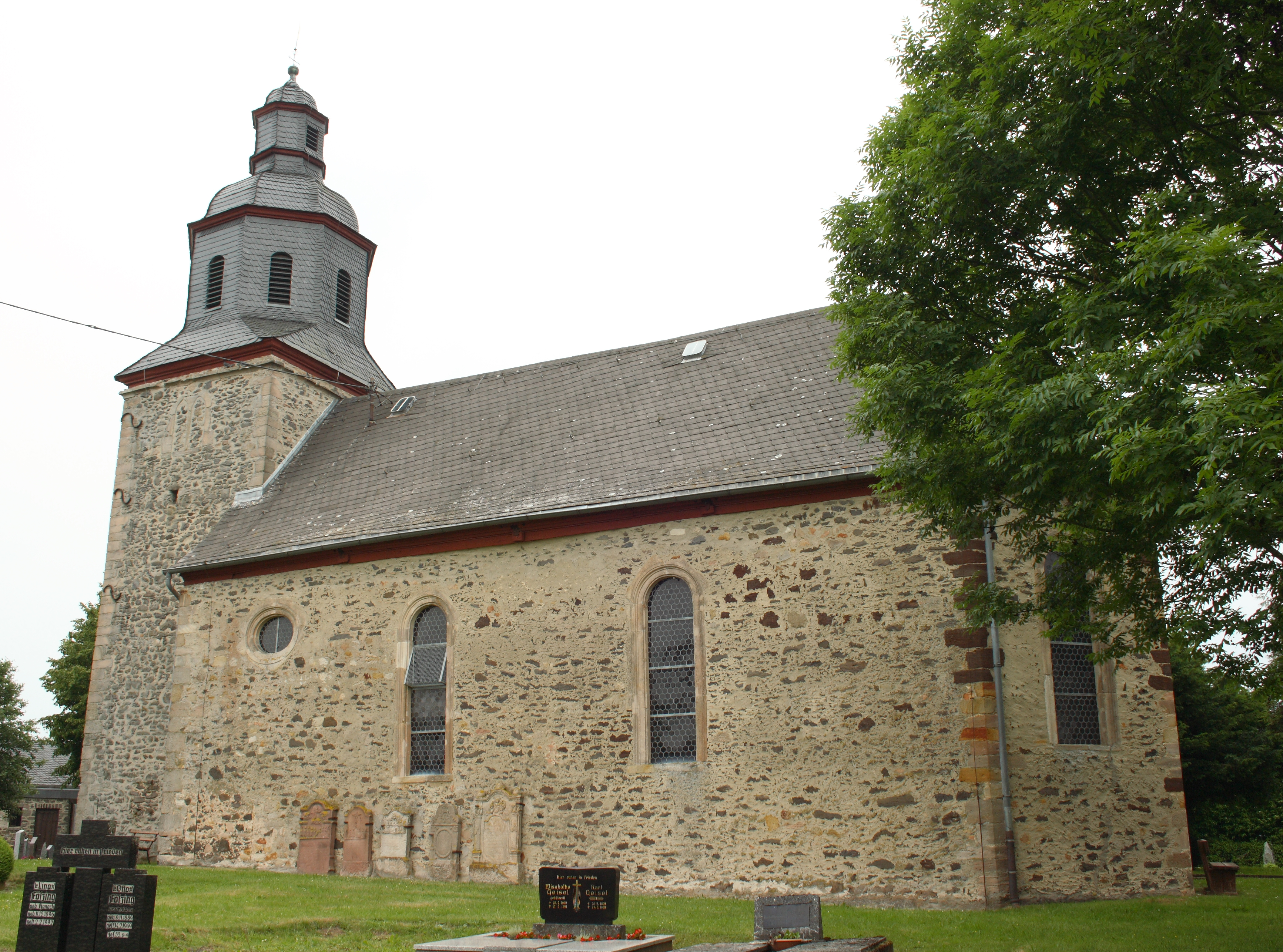 Evangelische Kirche in Billertshausen, einem Stadtteil von Alfeld im Vogelsbergkreis (Hessen)